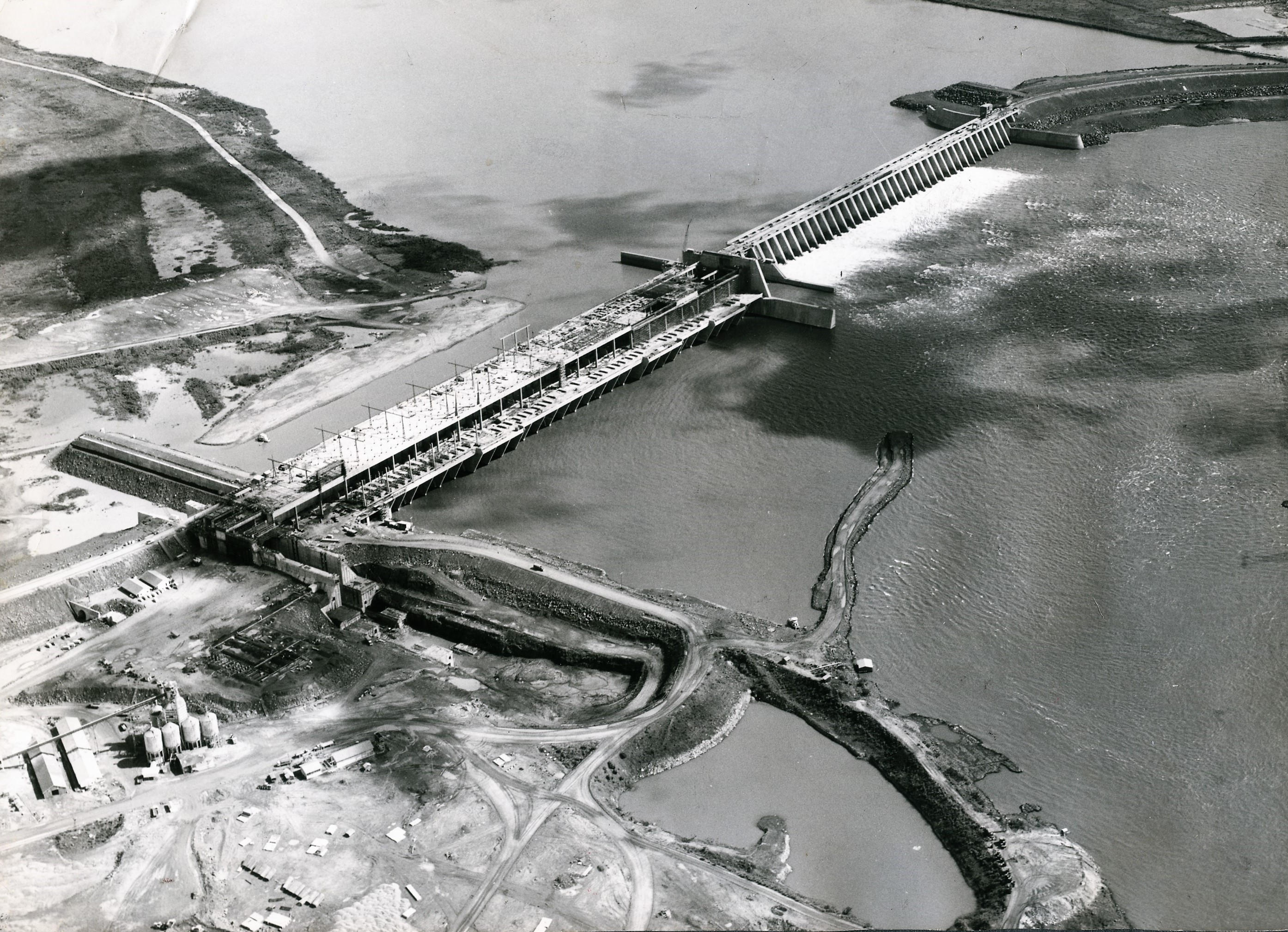 Fotografia do Fundo Correio da Manhã, sob a guarda do Arquivo Nacional.